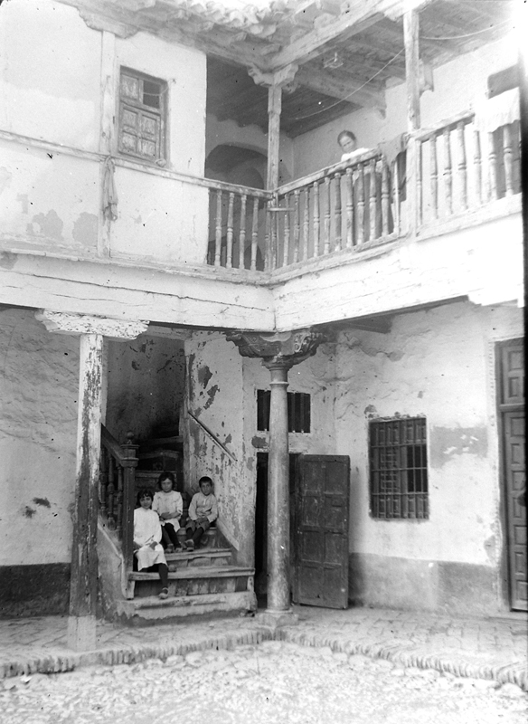 Còpia digital del negatiu original de vidre Llegat Dolors Moros, 2010 Museu d'Art Jaume Morera, Lleida. 2816